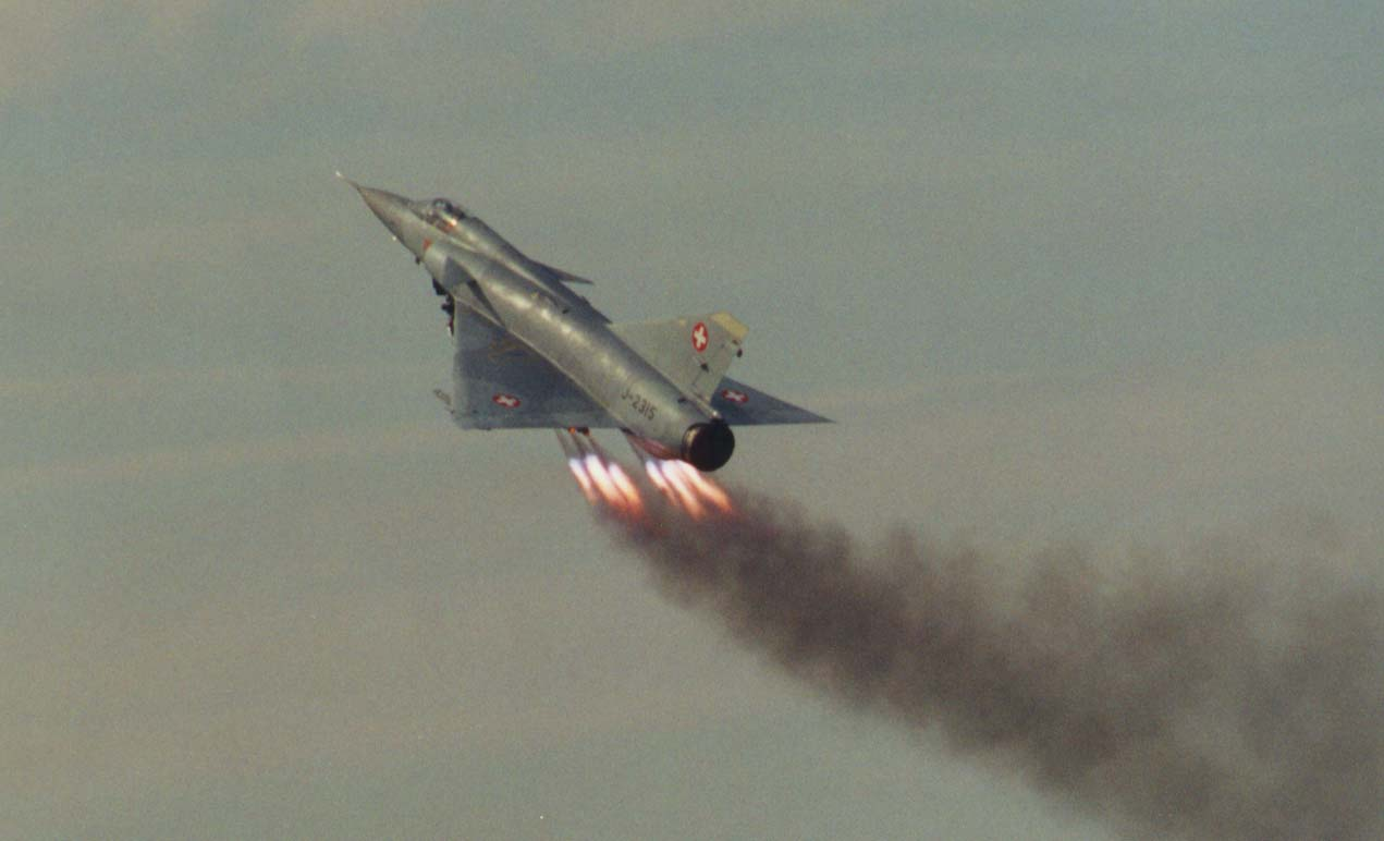 Jato flame